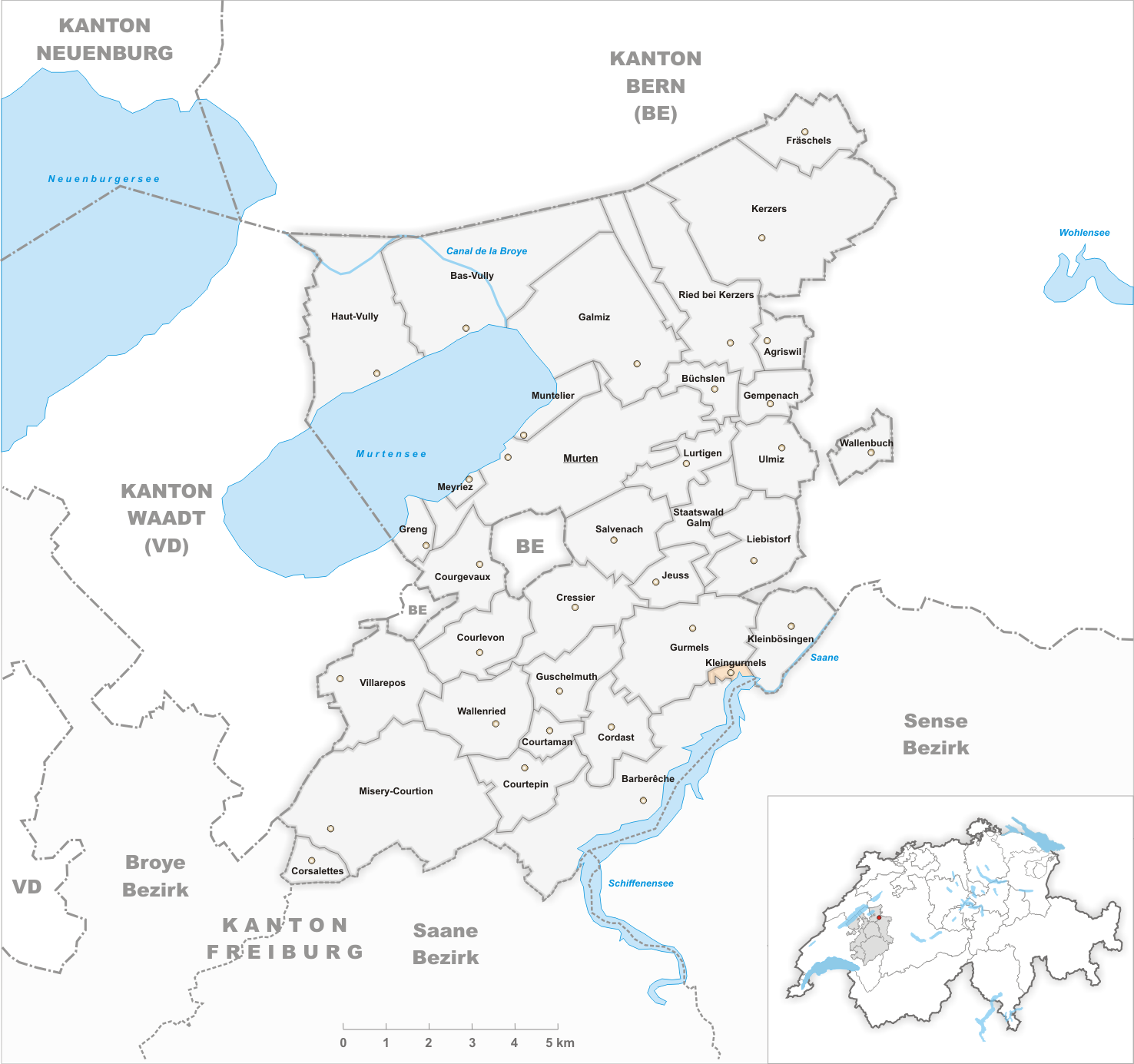 Municipality Kleingurmels Artist: Tschubby